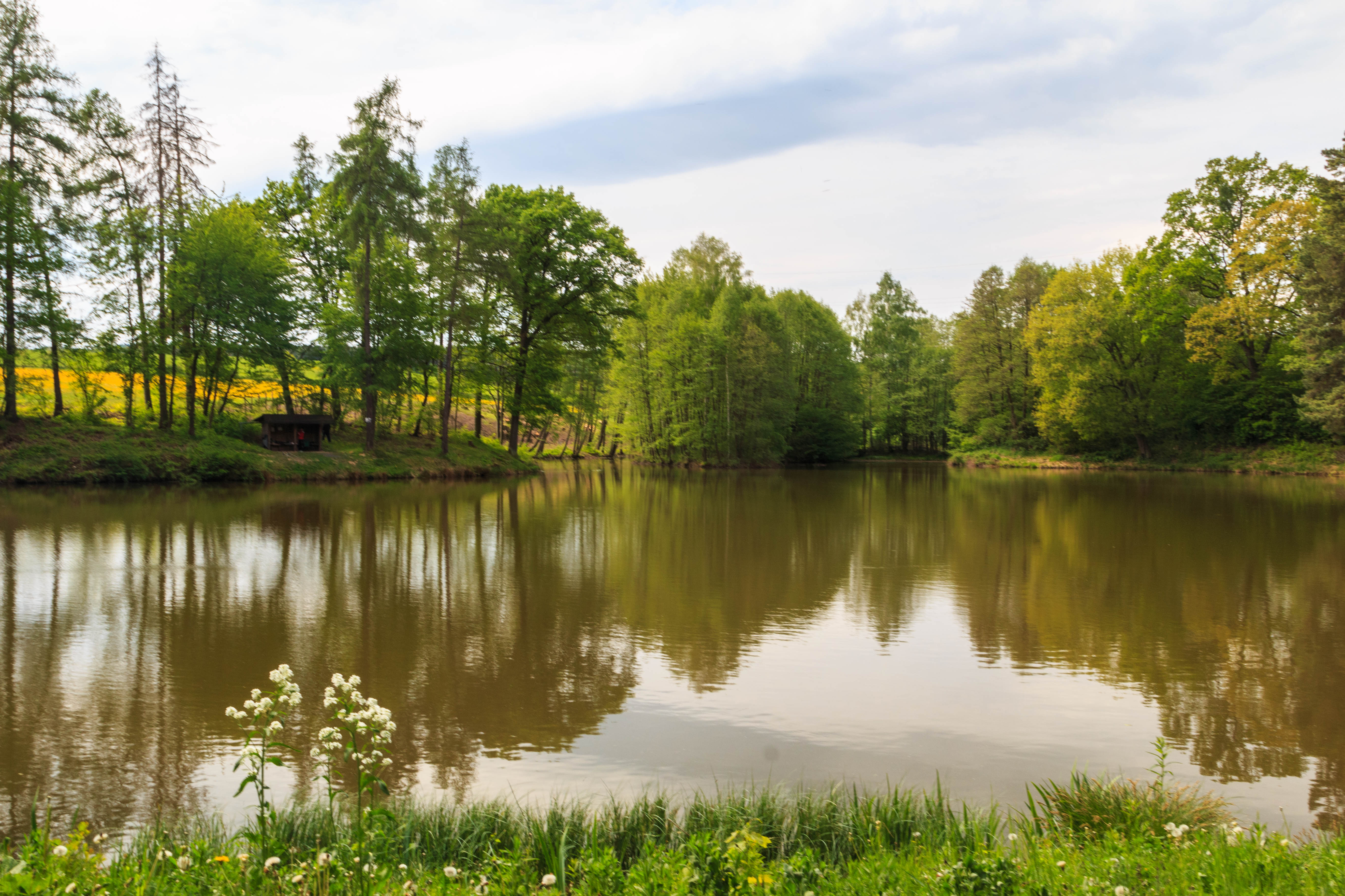 Rybník Herout u Konopáče Project: Vodstvo.